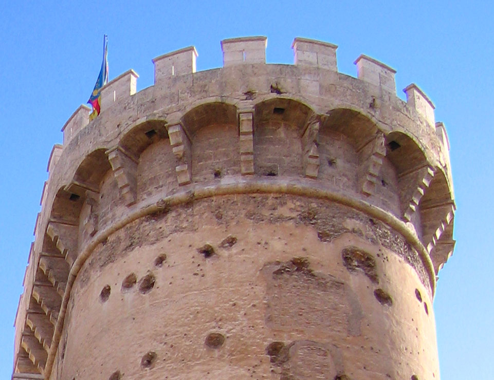 Impactes de bala a les torres de Quart (València)